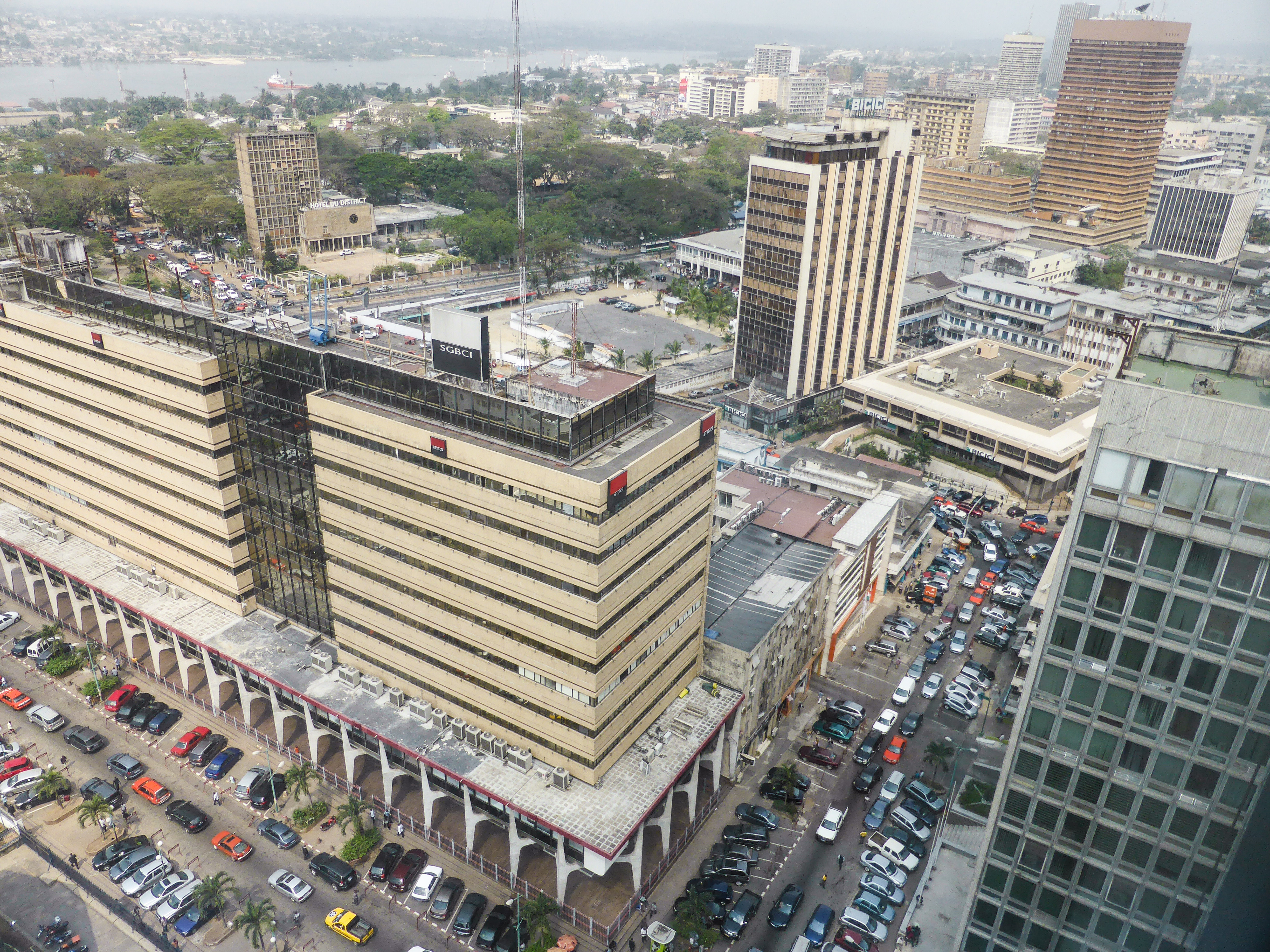 Quartier des banques au plateau à Abidjan